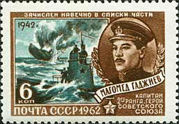 Почтовая марка СССР - Гаджиев Магомет (Магомед) Имадутдинович, Герой Советского Союза